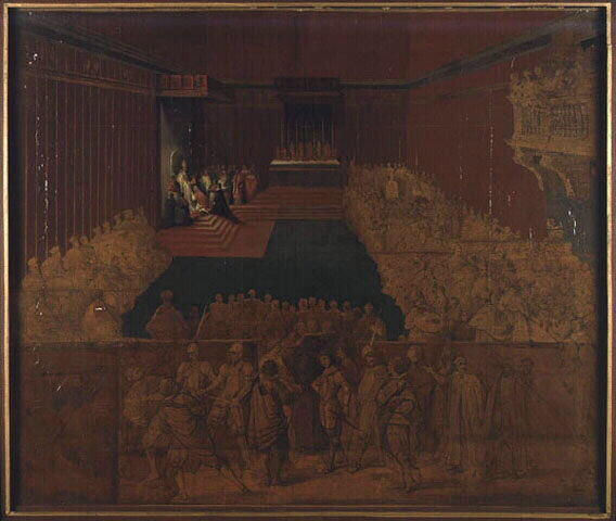 Investiture de Taddeo Barberini par Urbain VIII